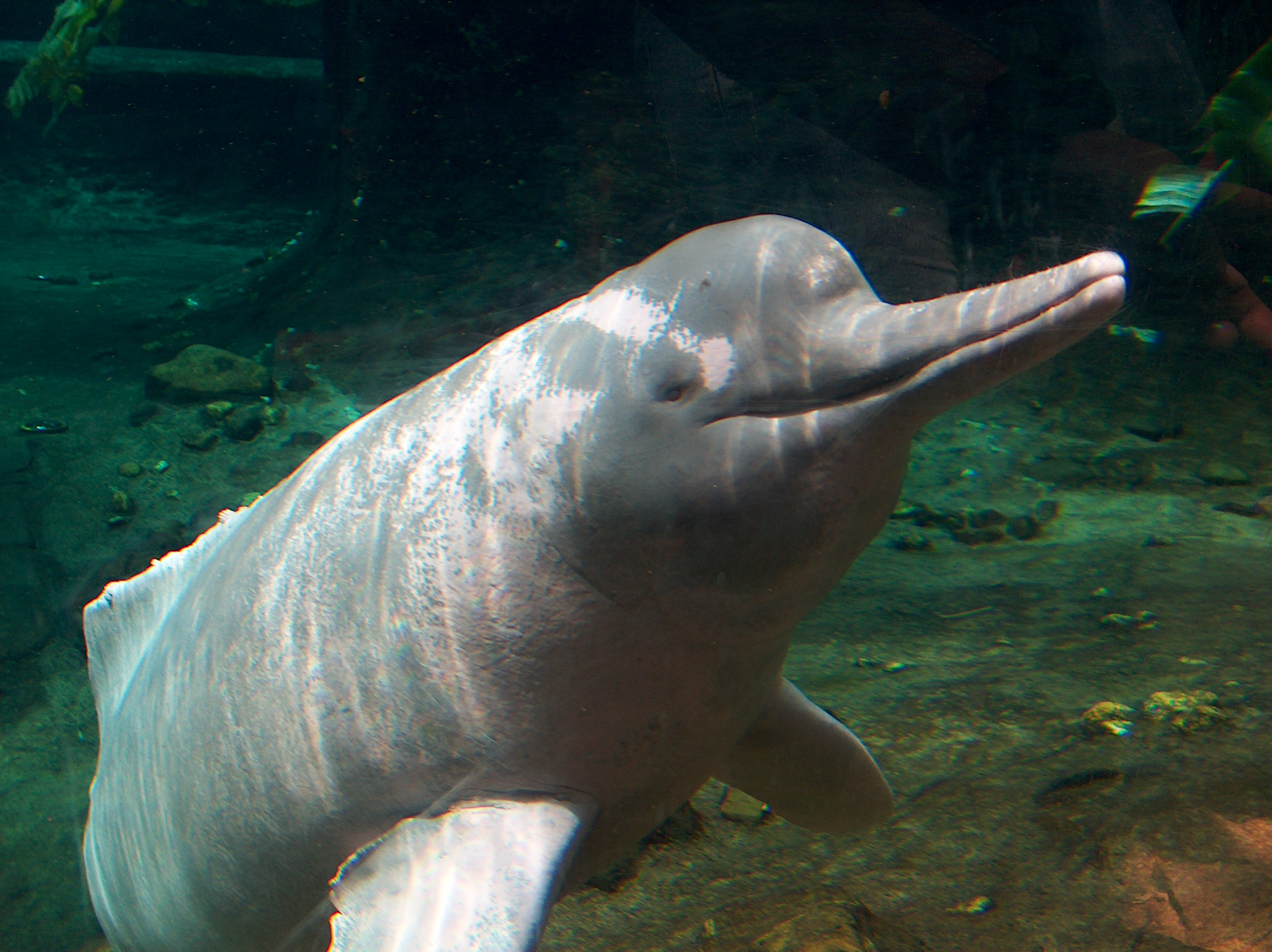 Amazonas-Flussdelphin: Orinoko im Zoo Duisburg